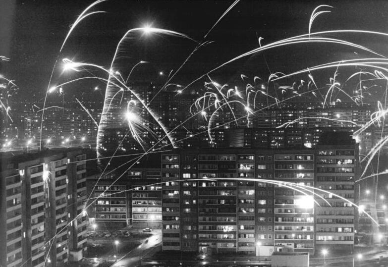 Berlin, Neujahrsfest, Feuerwerk ADN-ZB Zimmermann 20.12.1984 Berlin: Silvester-Feuerwerk in Berlin-Marzahn.